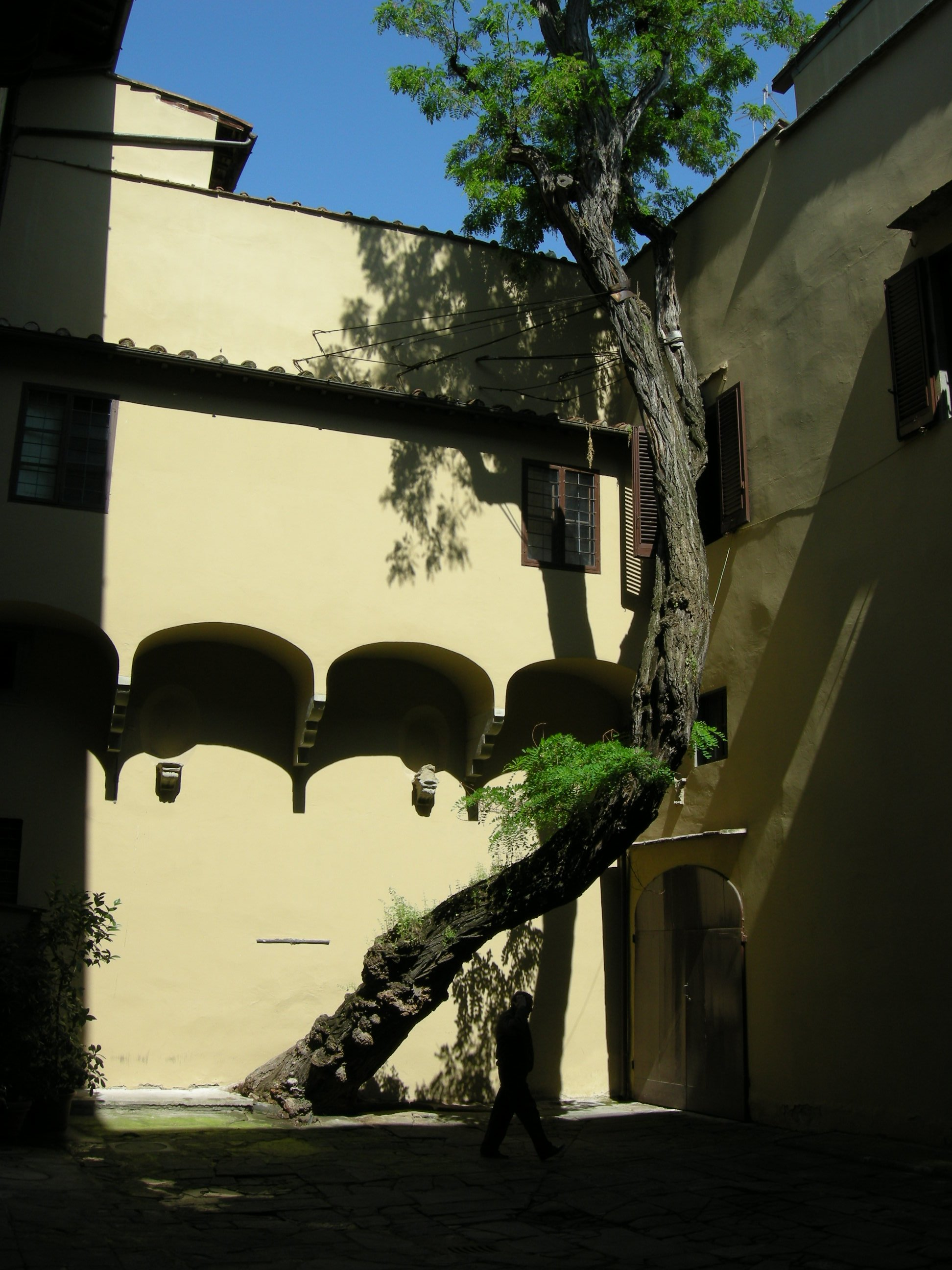 Palazzo de' pepi, cortile